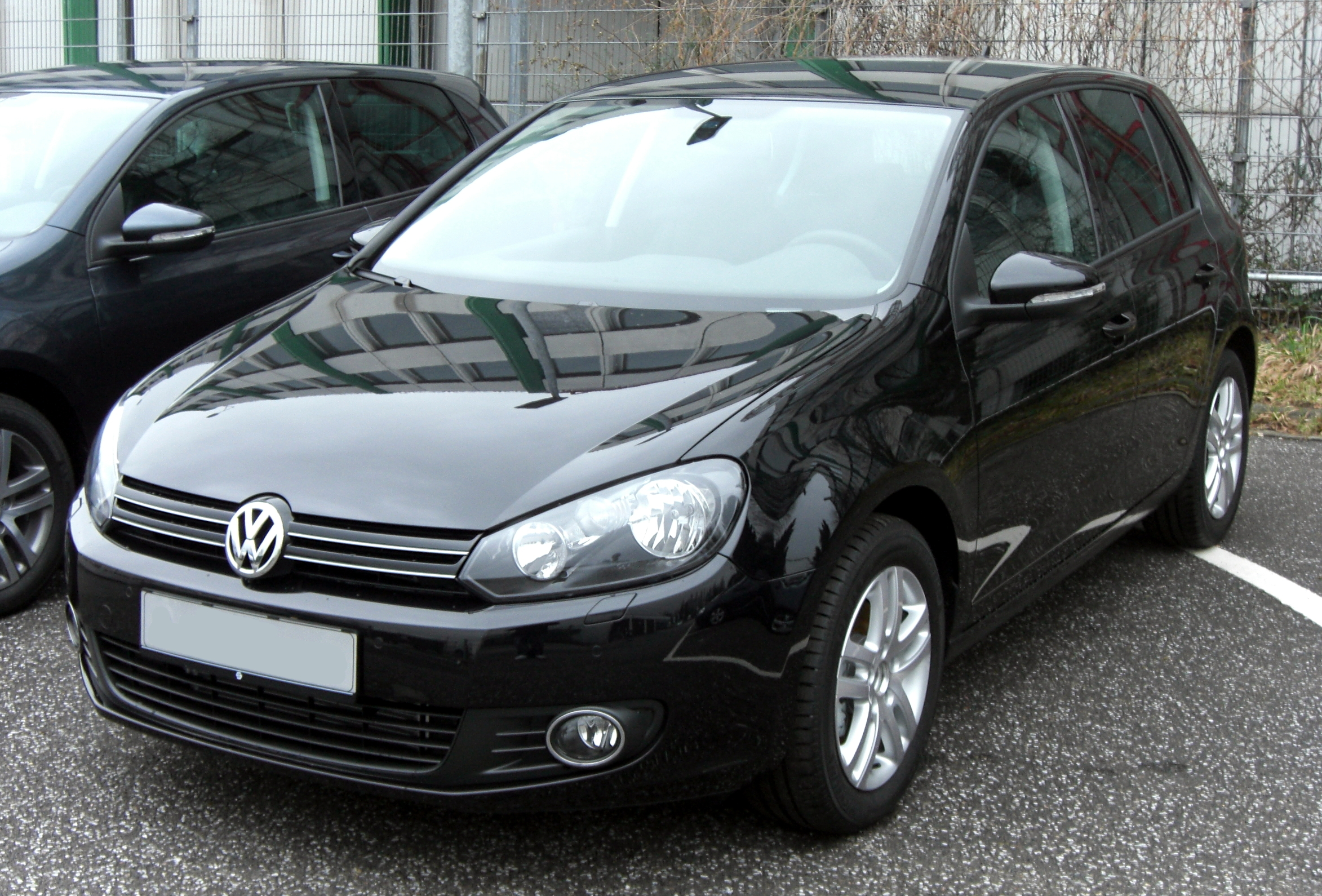 VW GOLF